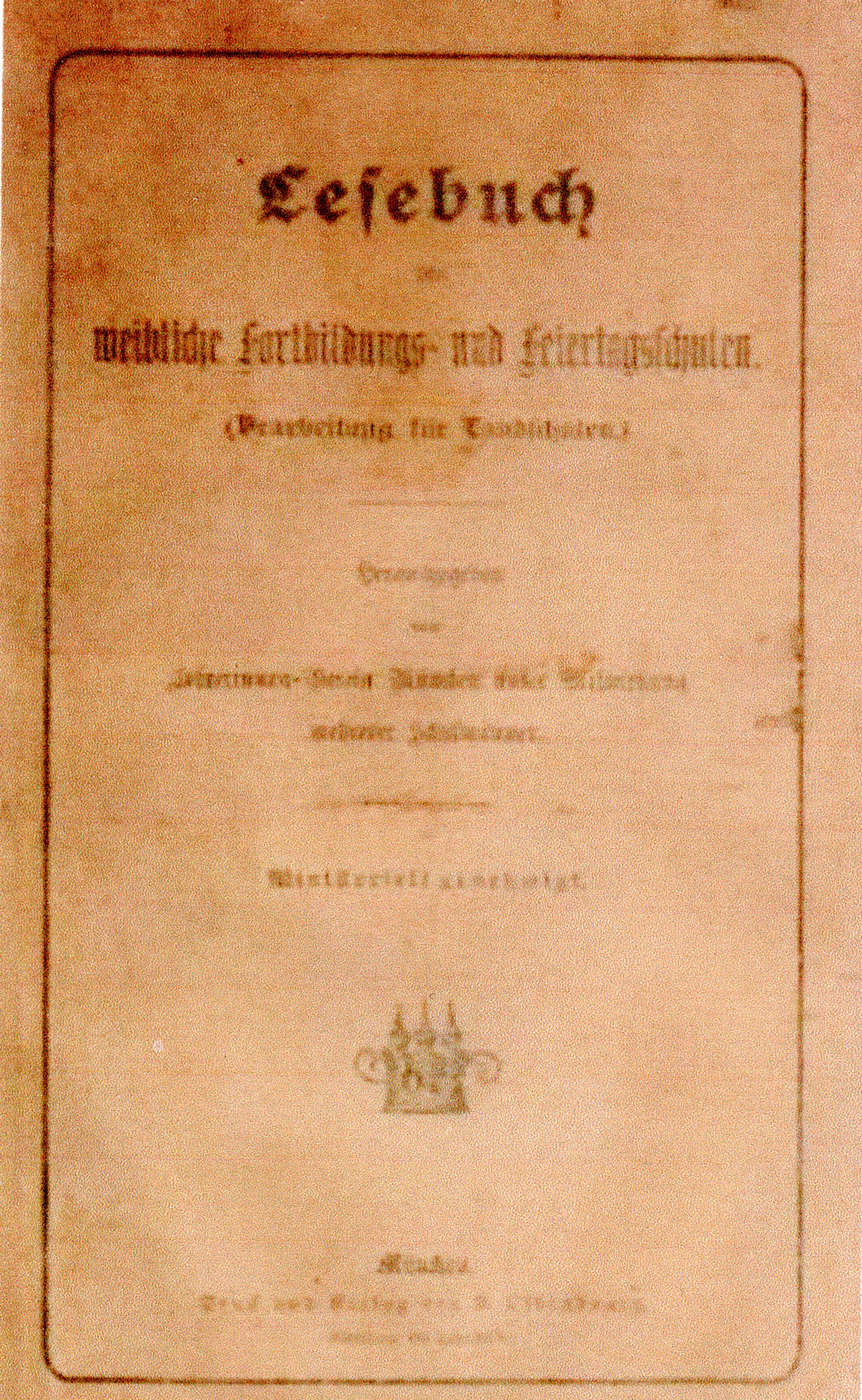 Lesebuch unter Mitwirkung von Helene Sumper